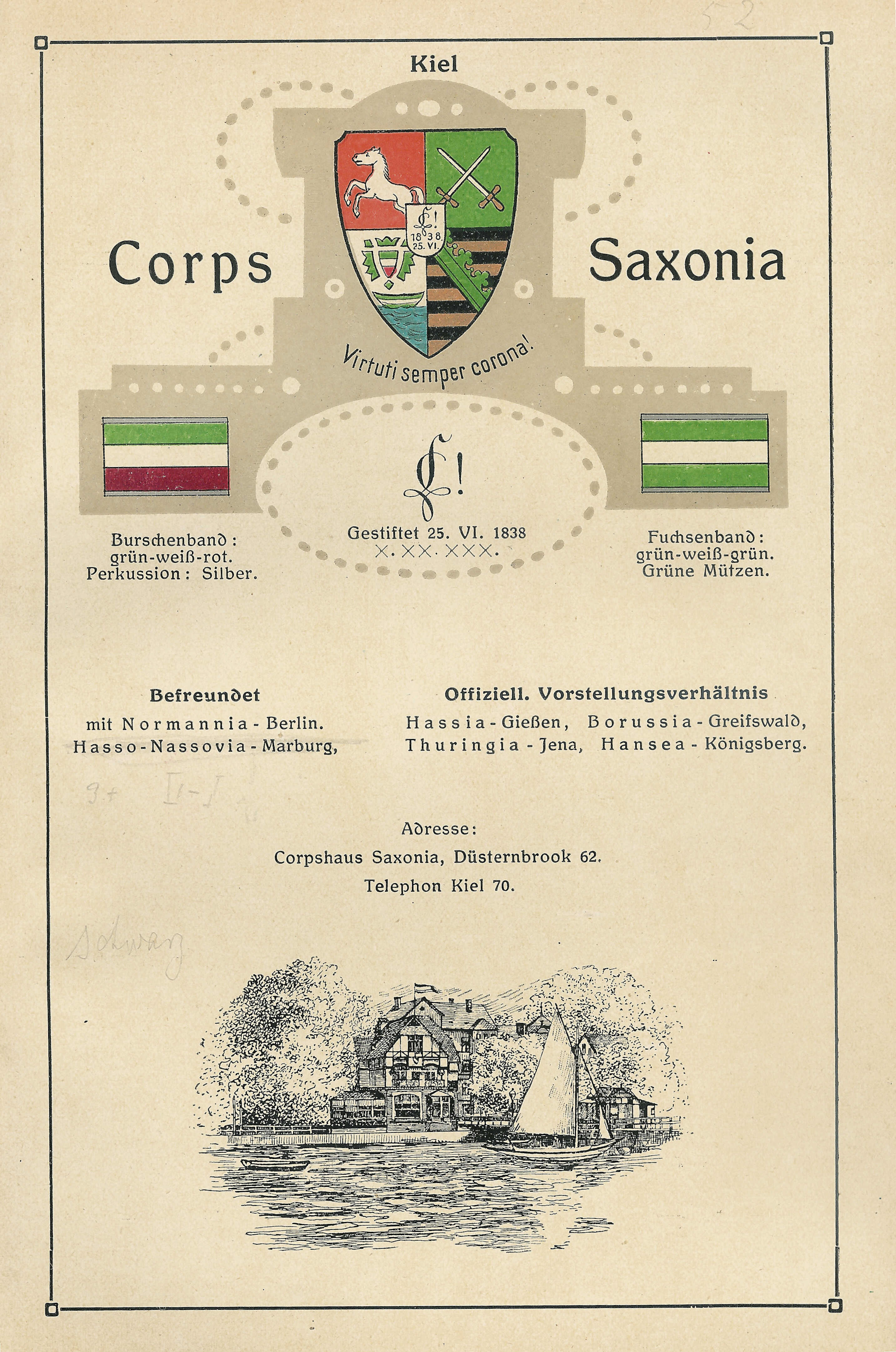 Wappen, Couleur, Zirkel und Corpshaus der Saxonia Kiel